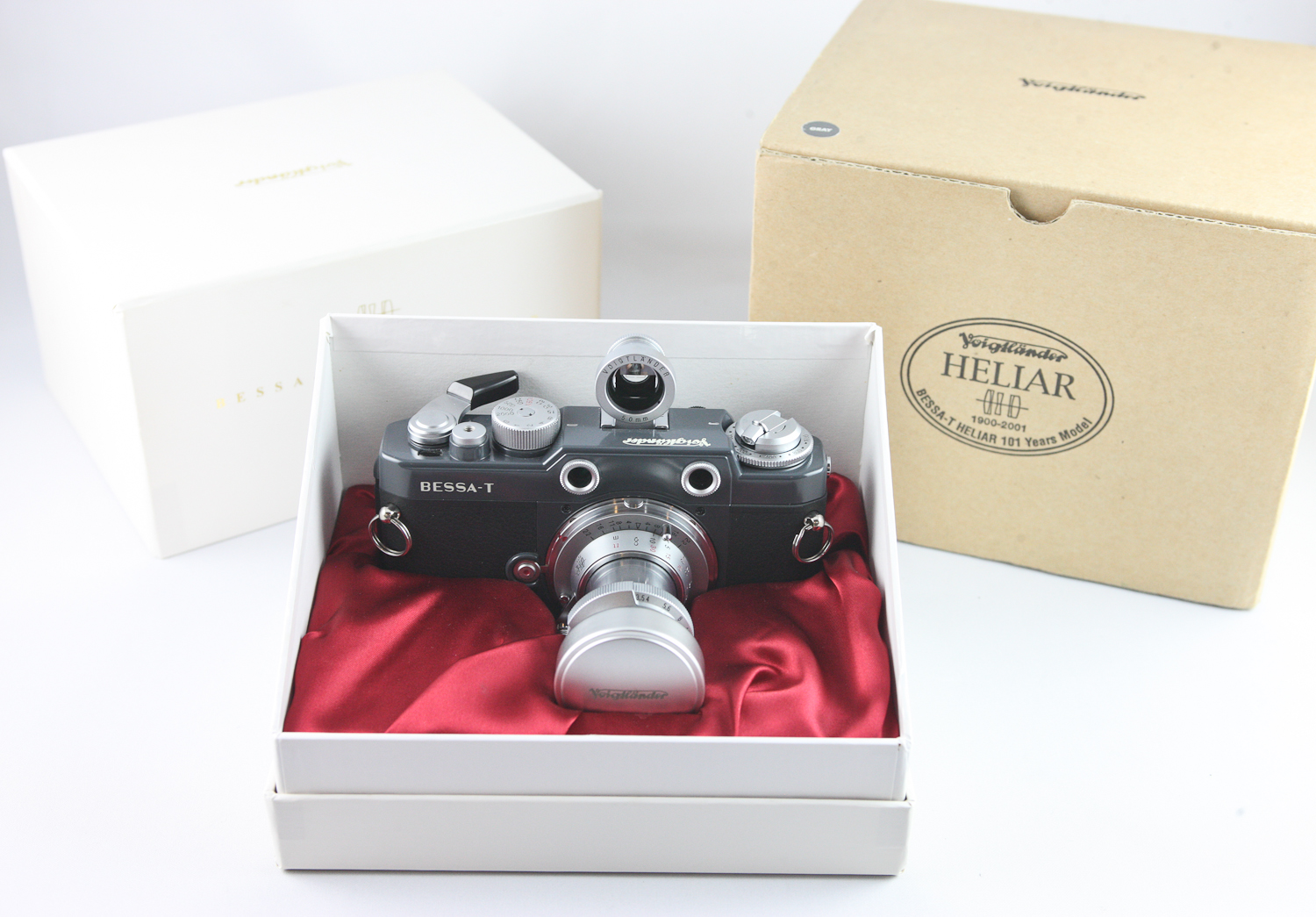 0482 Voightlander Helia 101 grey